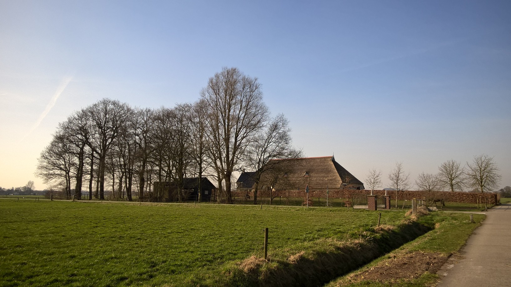 Boerderij 'Corpus de Linde' op De Linde, Marum (Gn) vanuit het zuiden.